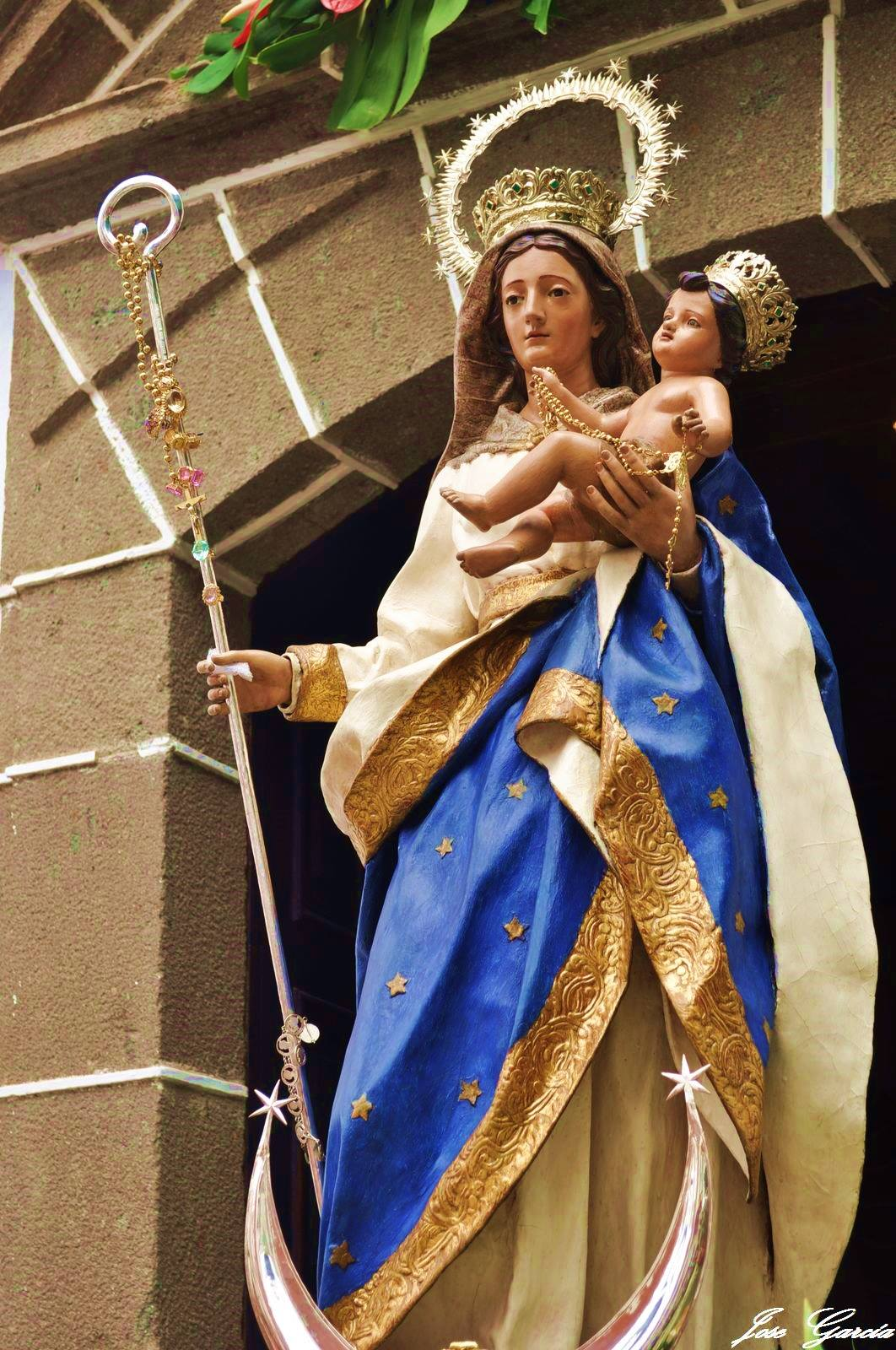 Imagen de Ntra. Sra. del Buen Suceso, copatrona de San Lorenzo. Siglo XVII. Autor anónimo.